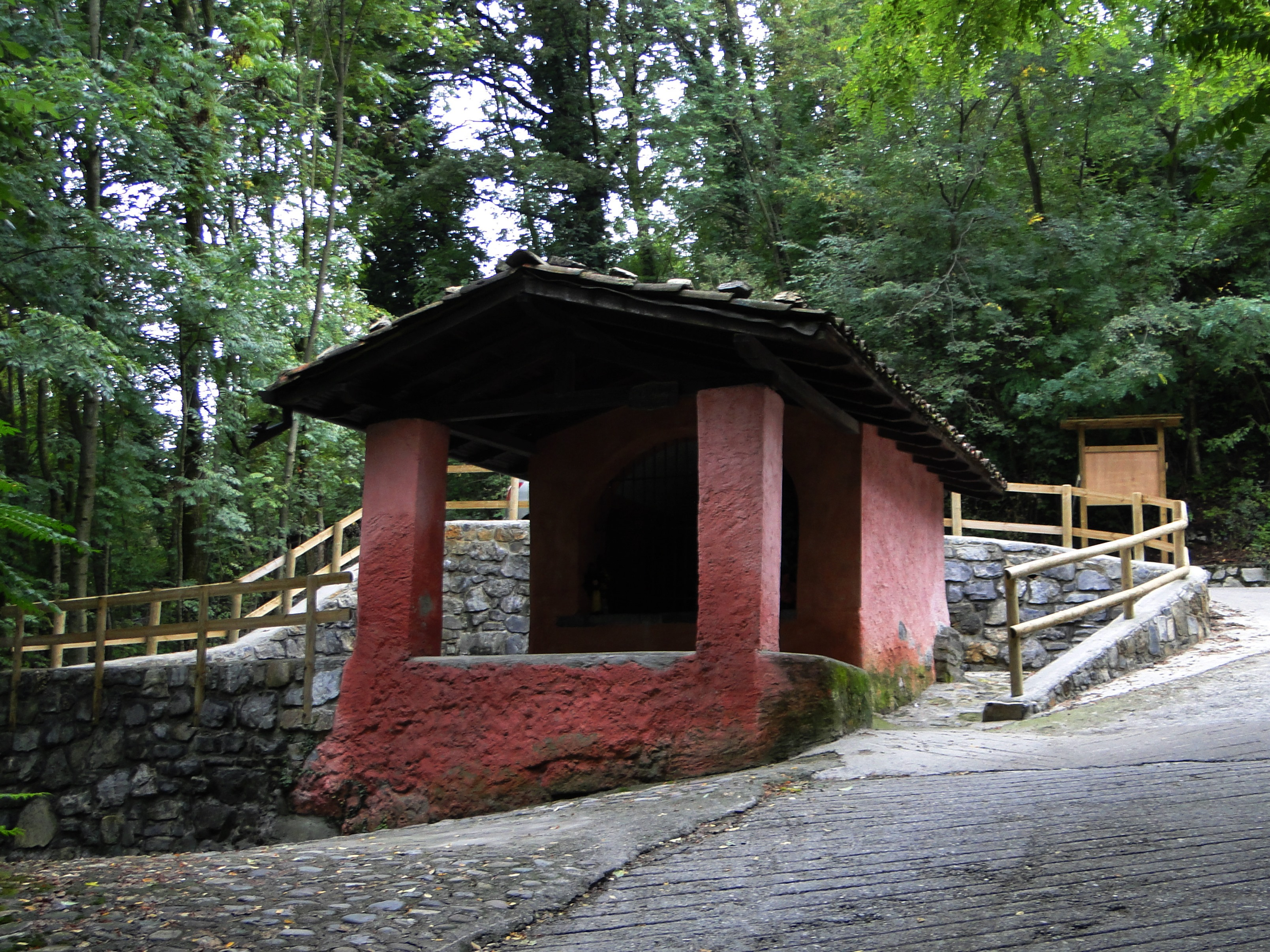 Fiorano al Serio (BG). Tribulina di Gromei